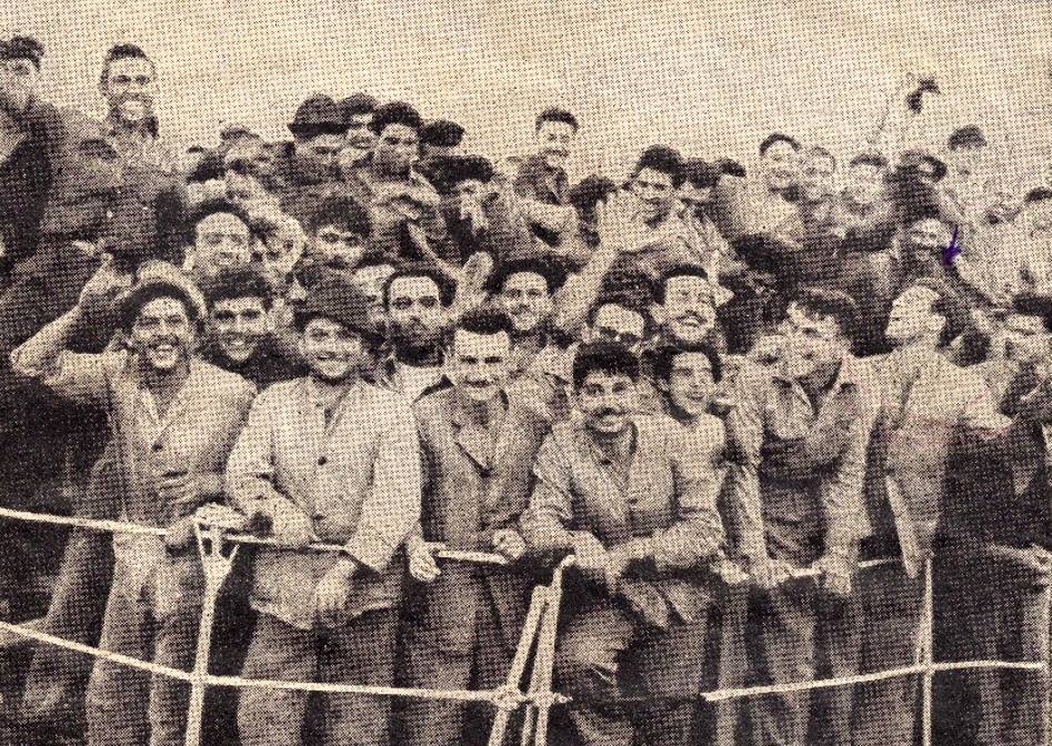 צוותי שייטת המשחתות צוהלים לאחר קרב חיפה והבנעת איברהים אל-אוול 31 באוקטובר 1956